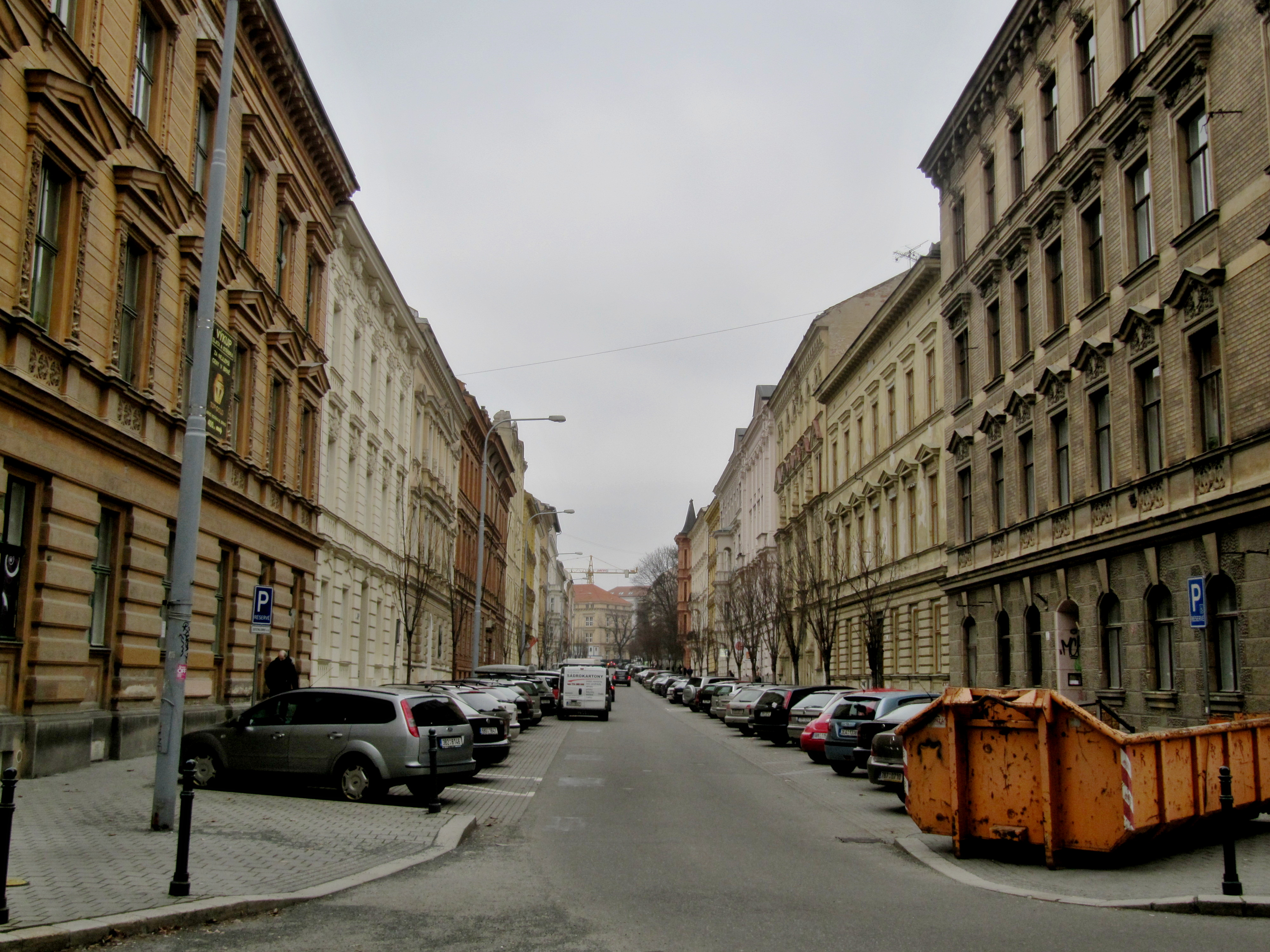 Brno, Jaselská ulice